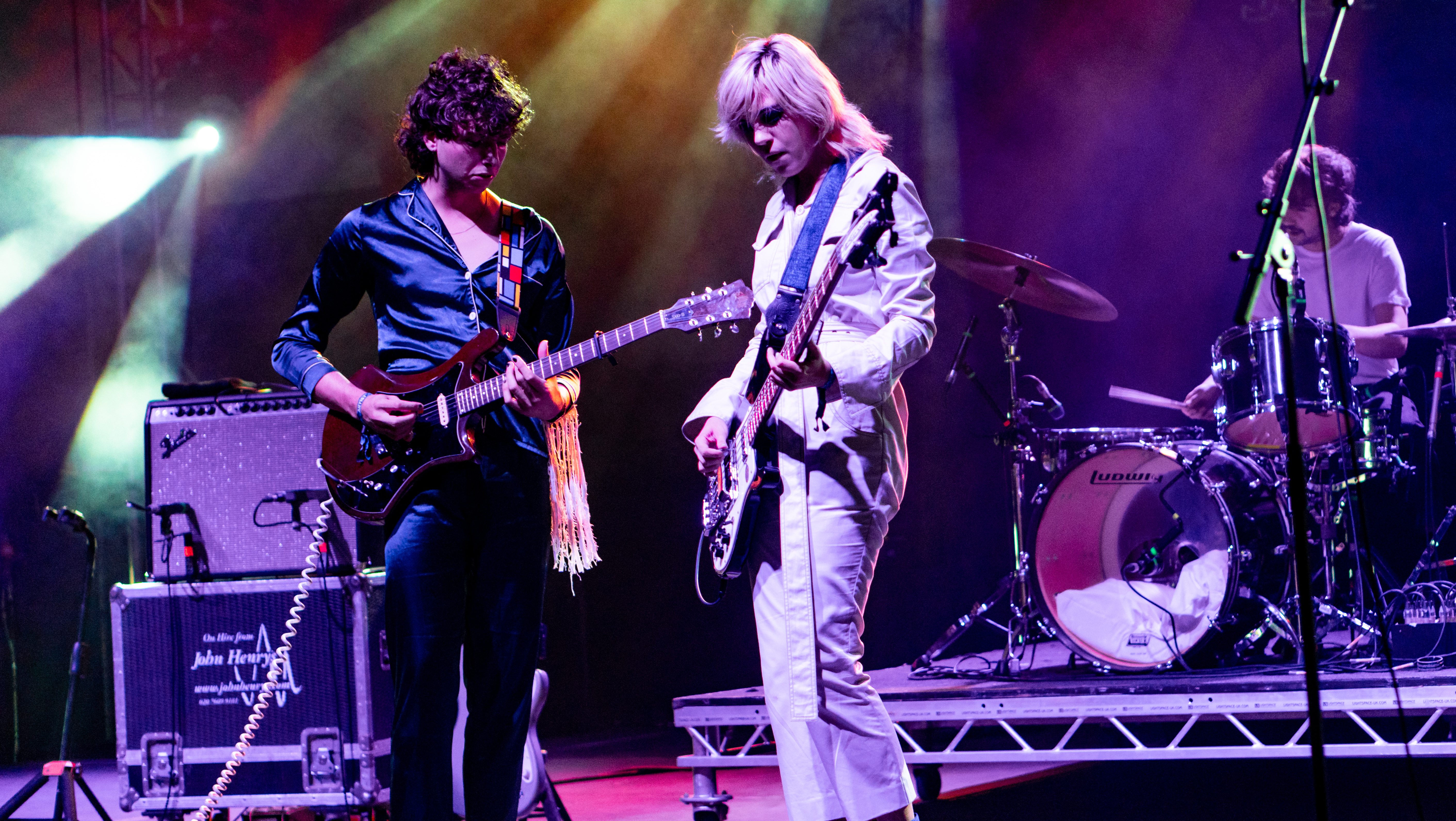 EOTR010918-50